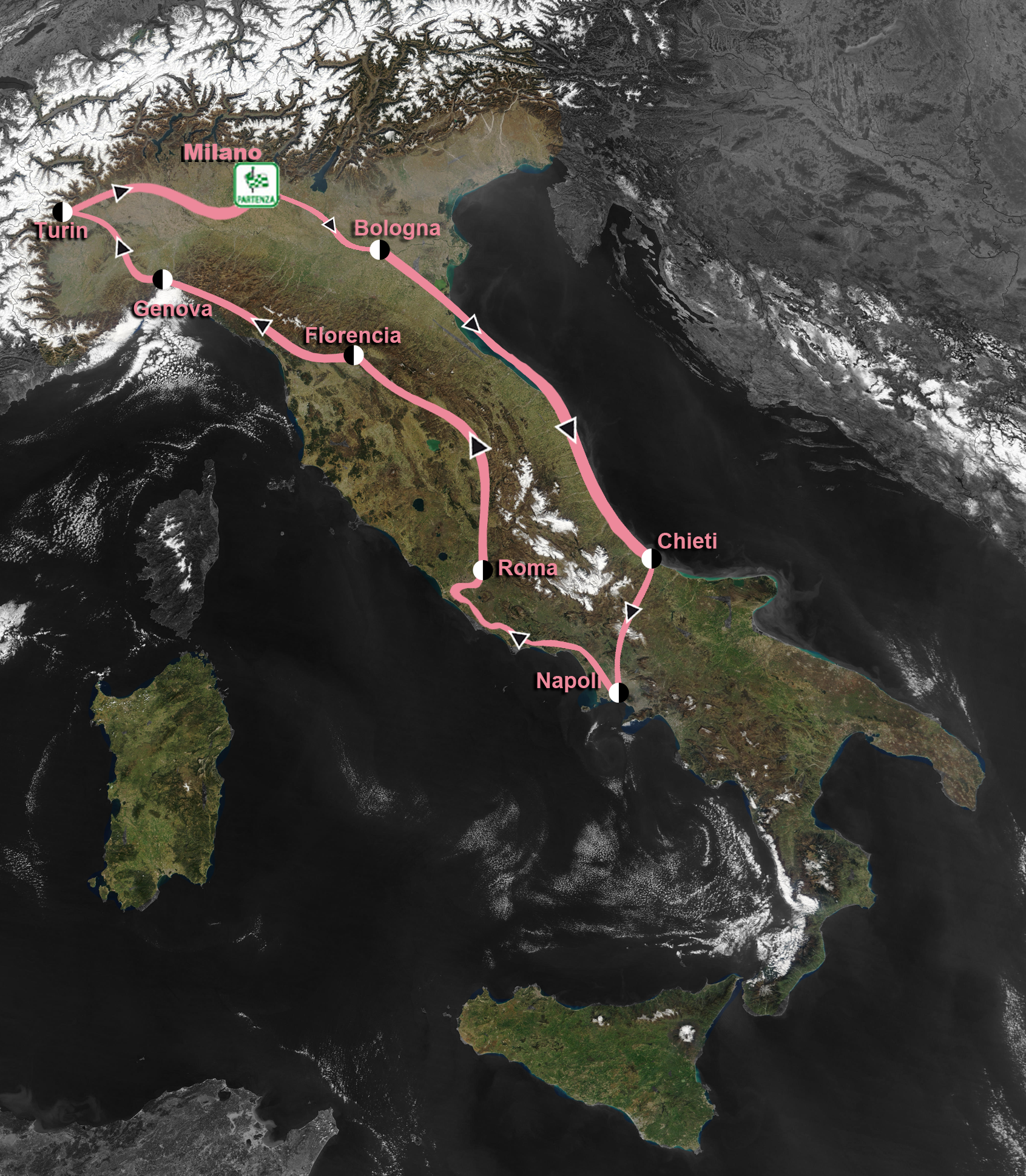 Etapas giro 1909